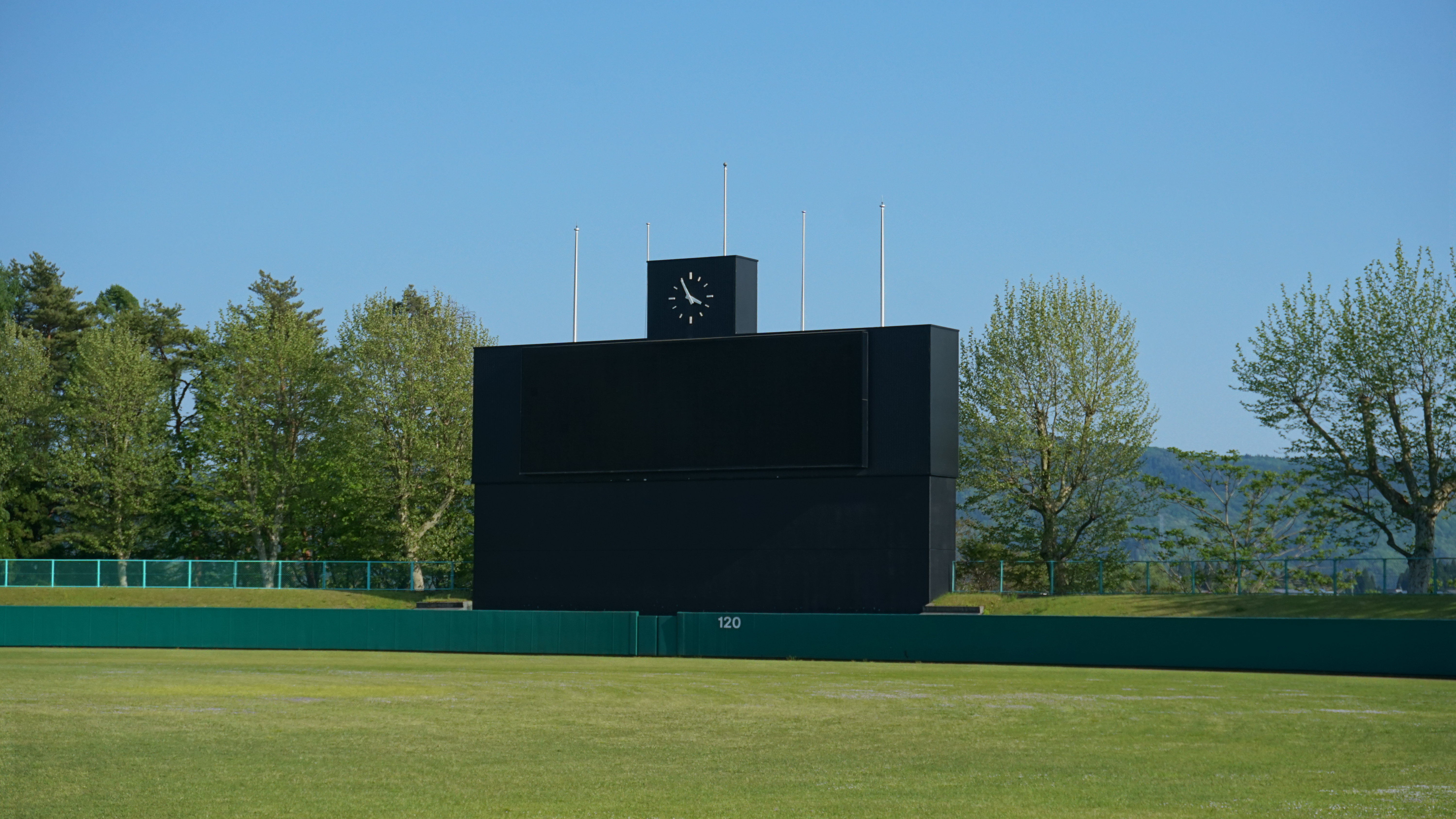 藤里町立清水岱公園野球場（秋田県山本郡）。全面フルカラーLEDが採用されている。